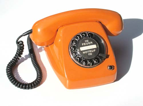 Post Telefon Fe TAp 615